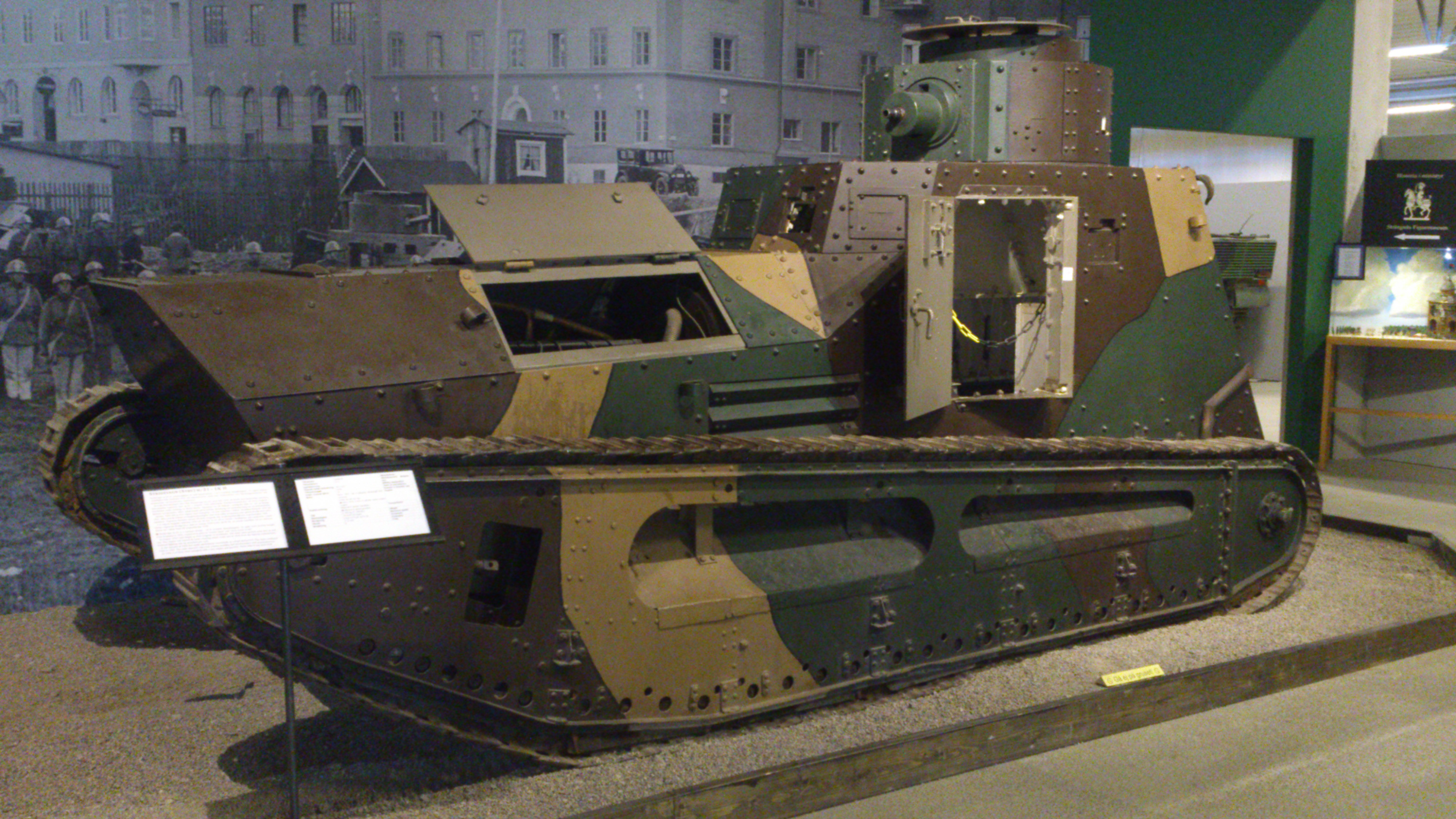 Stridsvagn M 21 på Försvarsfordonsmuseet Arsenalen i Strängnäs